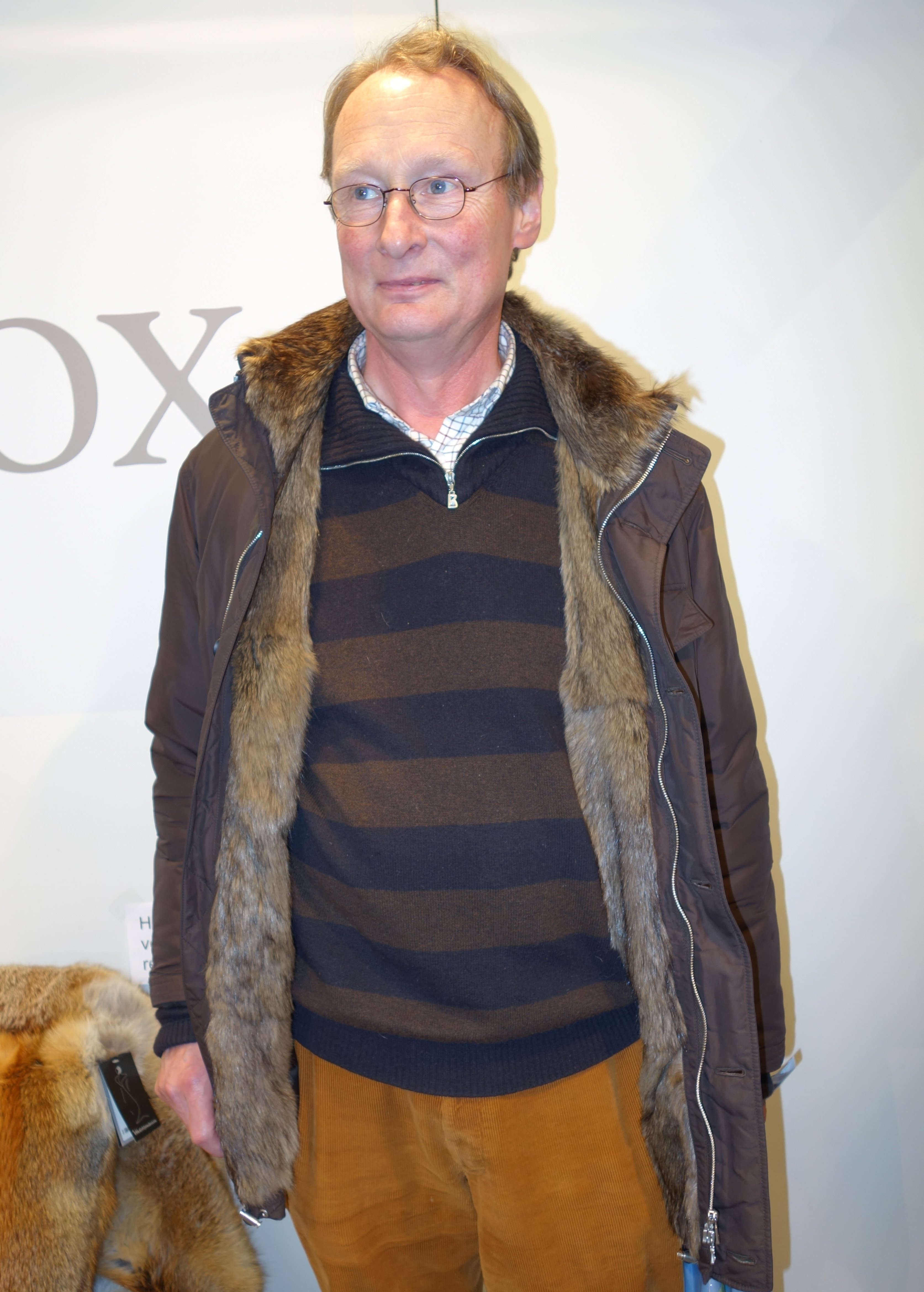 Herrenjacke der Firma Bogner mit einer Blende und Kragen aus Viscachafell. Gesehen bei einem Besucher der Messe „Jagd und Hund“, Dortmund Westfalenhallen (3. bis 9. Februar 2014).